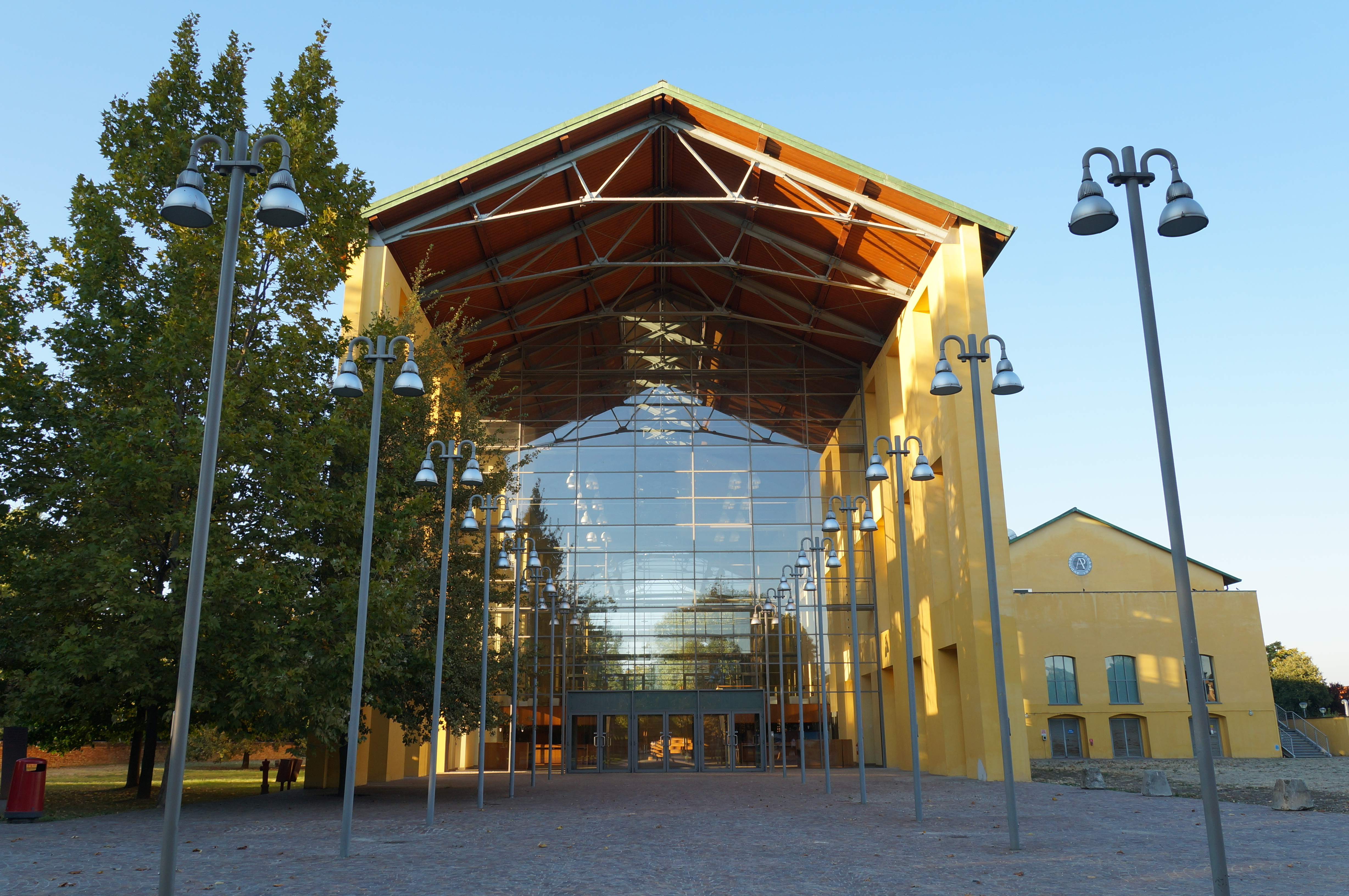 Auditorium Niccolò Paganini This is a photo of a monument which is part of cultural heritage of Italy.